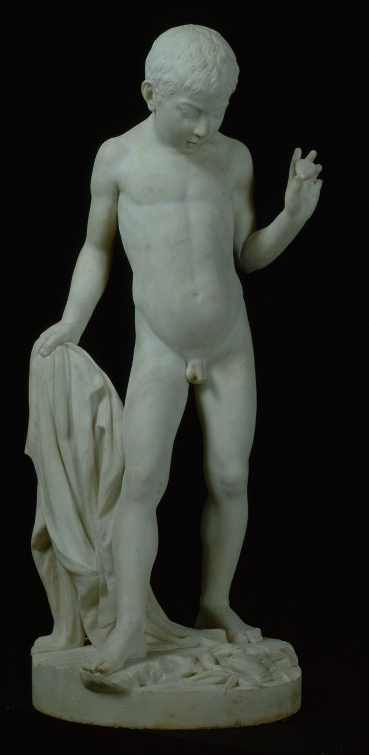 Werk des griechischen Künstlers Georgios Broutos